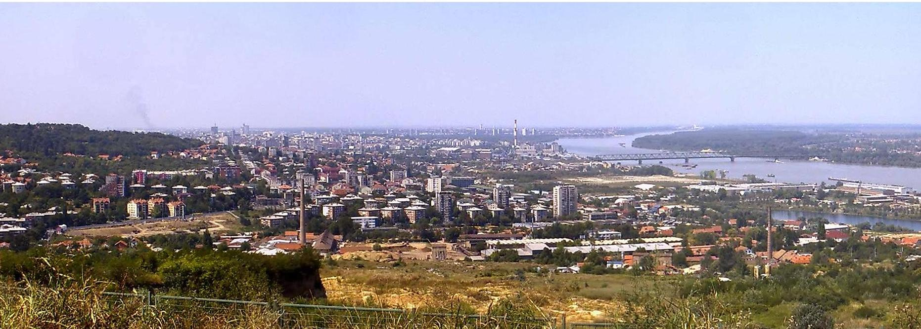 Srpskohrvatski / српскохрватски: Panorama Karaburme (u sredini slike). Na levom kraju se vidi Zvezdara, na desnom je Dunav i, odeljen Adom Hujom, Rukavac (manja vodena površina južno tj. ispod). Južno (dole i levo) od Rukavca je kraj Rospi Ćuprija. Dva visoka dimnjaka ispred naselja pripadaju ciglanama (verovatno "Polet" i "Jedinstvo"), koje će verovatno nestati, jer je planirana gradnja naselja Višnjičko Polje na padini ispod mesta snimanja. Dunav premošćuje Pančevački most. U daljini se nazire grad, sve do Novog Beograda i Zemuna; na horizontu se ističu Beograđanka, Zapadna kapija Beograda (levo, preko Zvezdare) i dimnjak električne centrale na Dorćolu (blizu Dunava). Snimljeno 7.8.2008. sa brda (i groblja) Lešće, generalno u pravcu zapada.